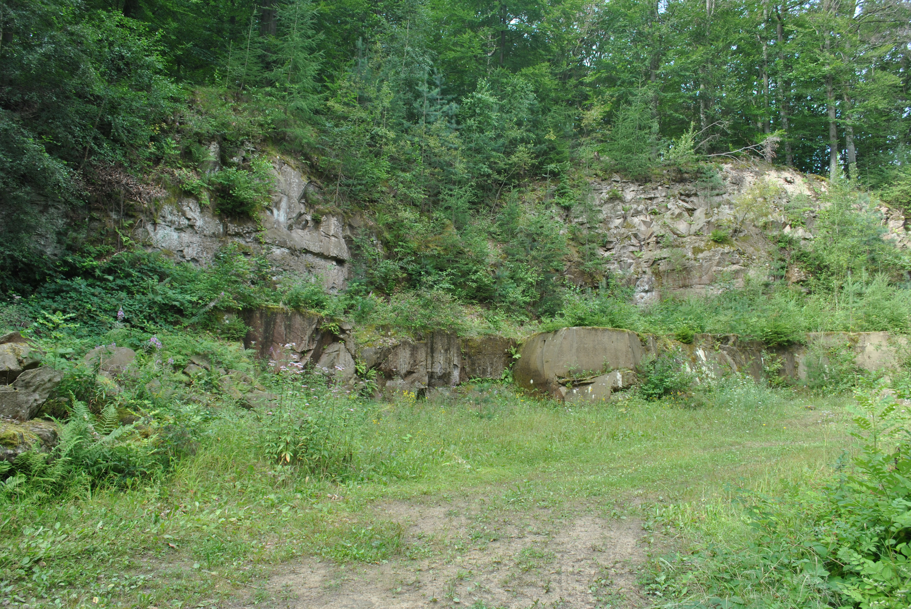 Geotop Ortelsbruch ESE von Abtswind: Der feinkörnige Sandstein mit sehr gleichmäßiger Struktur wird zeitweise noch in 2 Lagen mit je 2 bis 3 m Mächtigkeit abgebaut. Von hier stammen Bausteine für die Würzburger Residenz.